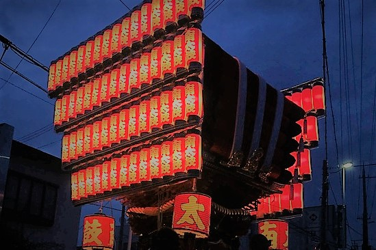 提灯で飾られた貝塚南太鼓